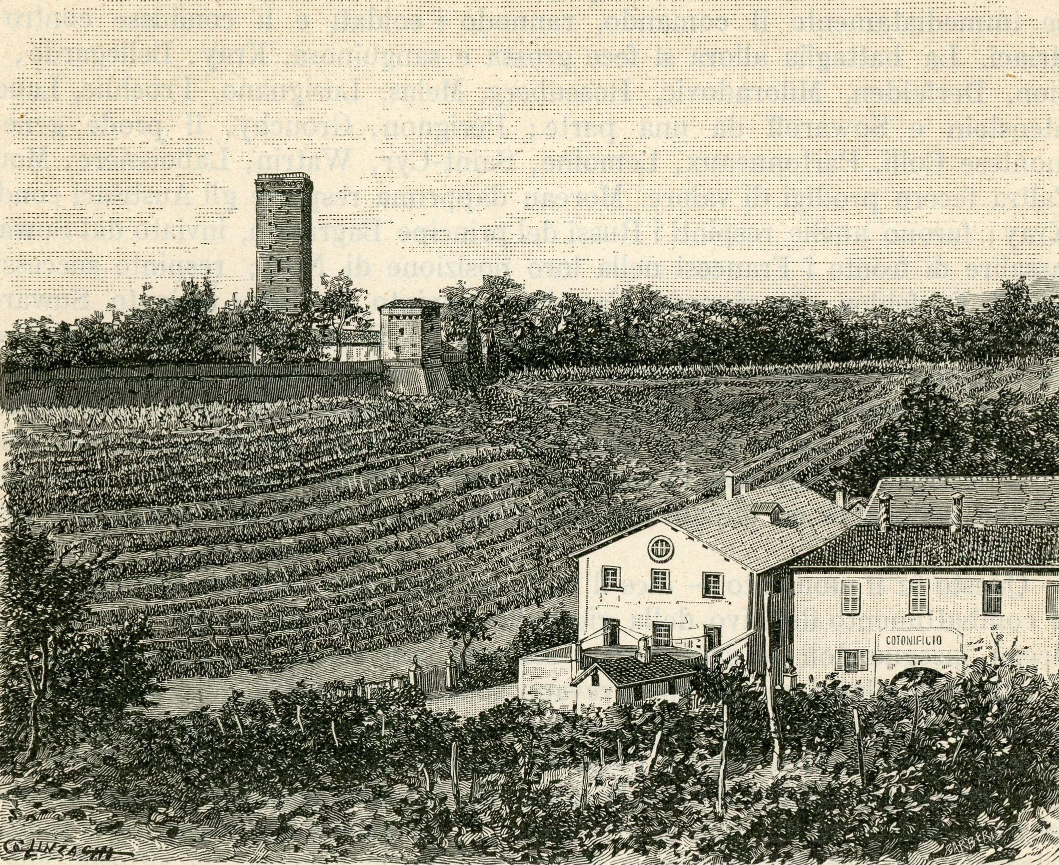 Castello di Novi Ligure (xilografia di Giuseppe Barberis e Colinza?).